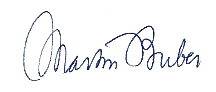 Martin Buber. Signatur seines Briefes vom 5.10.1953 an meinen Vater Erich Wewel